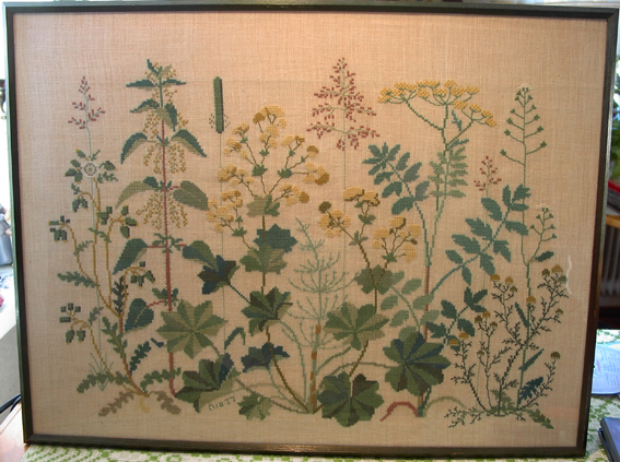 Tavla "Blommorna vid vägen" efter mönster av Clara Waever, från 1977. En lite rolig detalj i sammanhanget är att jag beställde tavlan, min mor ovetandes, 1975, och vid uthämtningen på posten visade det sig att mamma hade exakt samma broderi bland sina ofullbordade textilier där den legat i 25 år! Jag hann klart före mamma, 1977, men det var med nöd och näppe. Se även: Brännässla i korsstygn Detalj av korsstygn